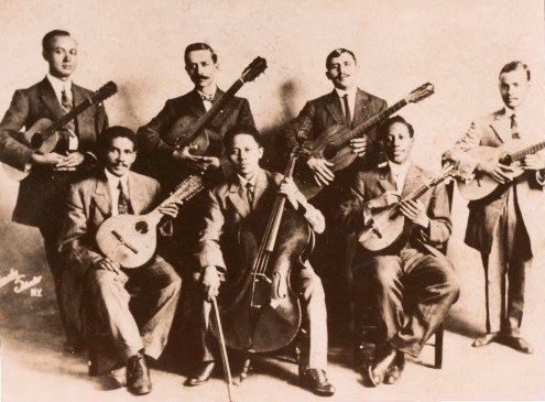 La Lira Antioqueña, invitada por Columbia Phonograph Co. Foto tomada por Apeda Studio en Nueva York.